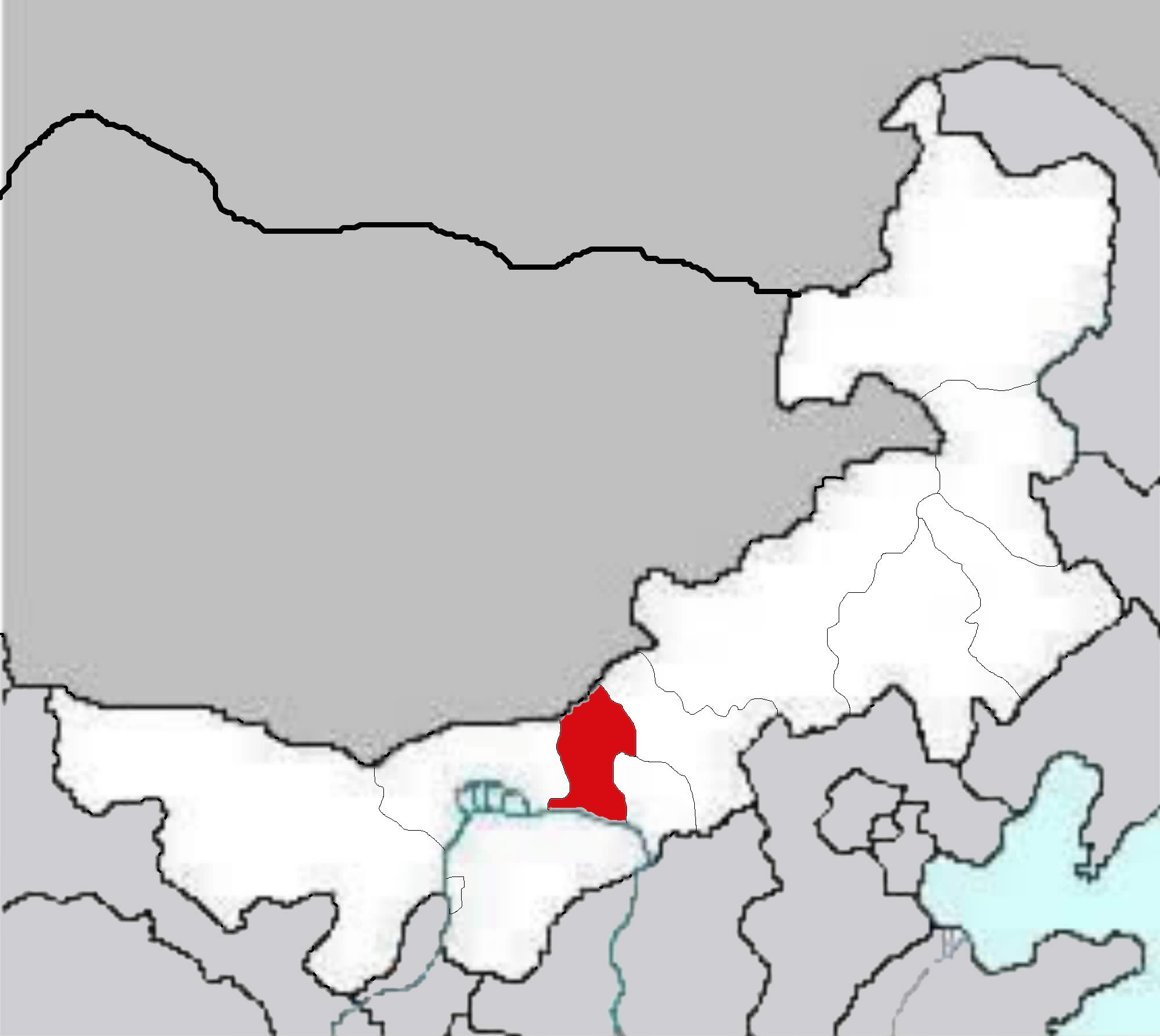 Inner Mogolia Maps